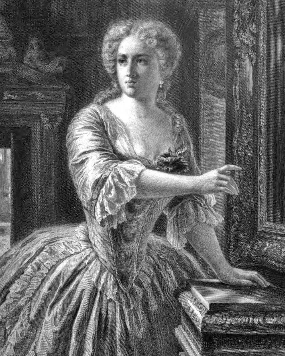 Amalia aus Friedrich Schillers Drama Die Räuber, als Stahlstich gestochen um 1859 nach einer Zeichnung von Friedrich Pecht